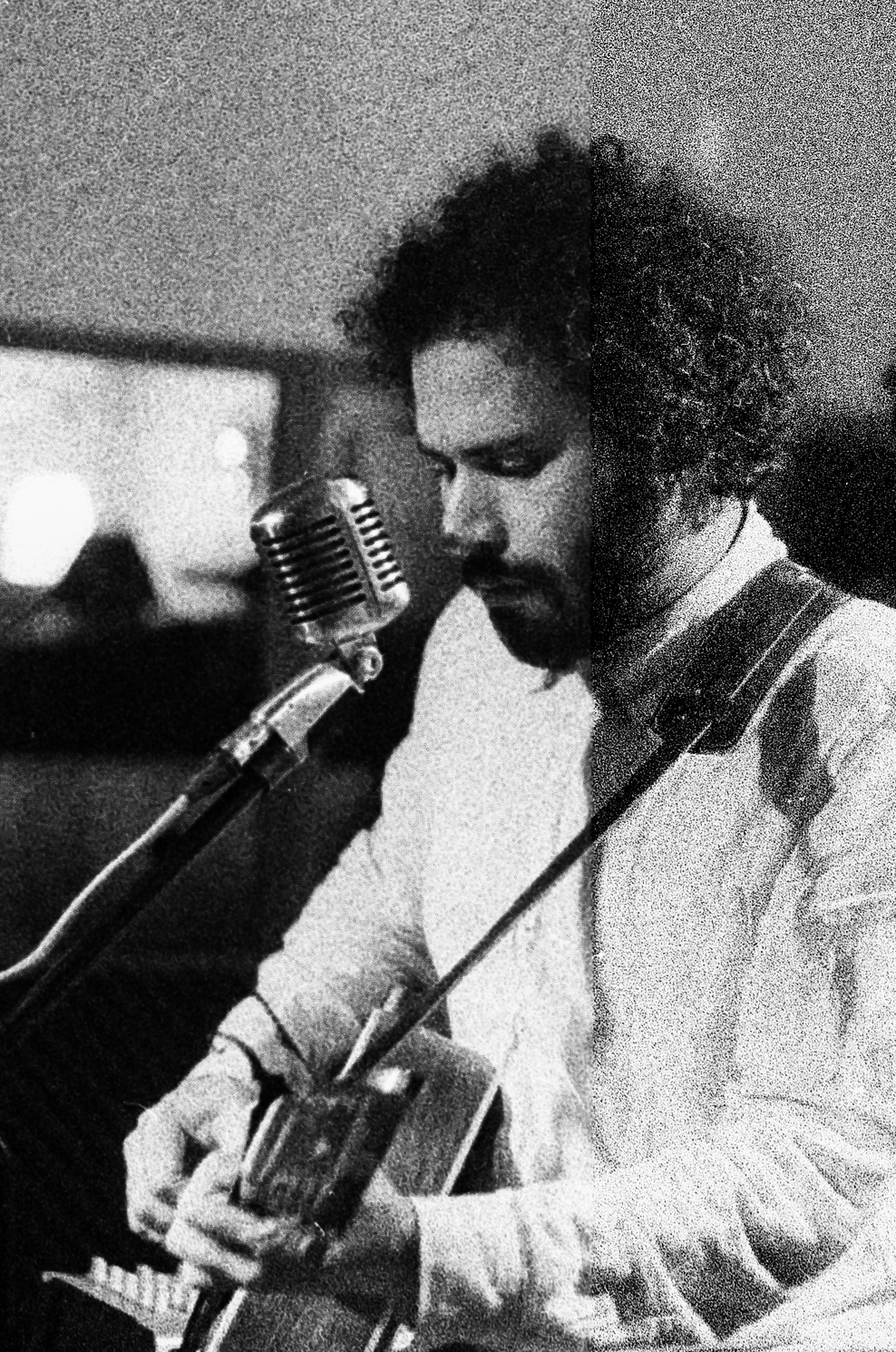 Leonardo Marques ao vivo em Belo Horizonte - MG (2020)